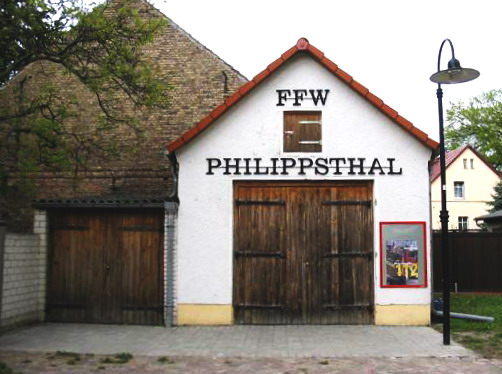 Freiwillige Feuerwehr Philippsthal, Brandenburg Gemeinde Nuthetal